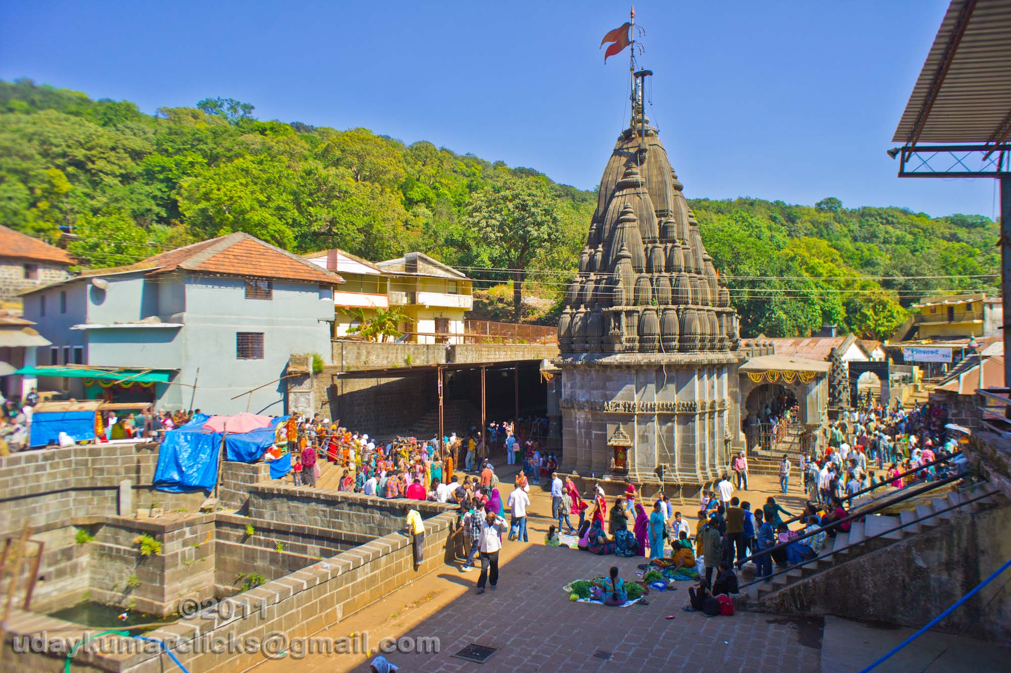 BhimaShankar